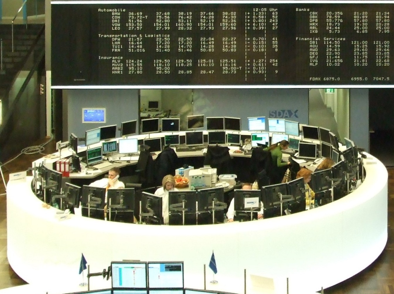 Dirk Müller (telefonierend) vor der DAX Anzeigetafel